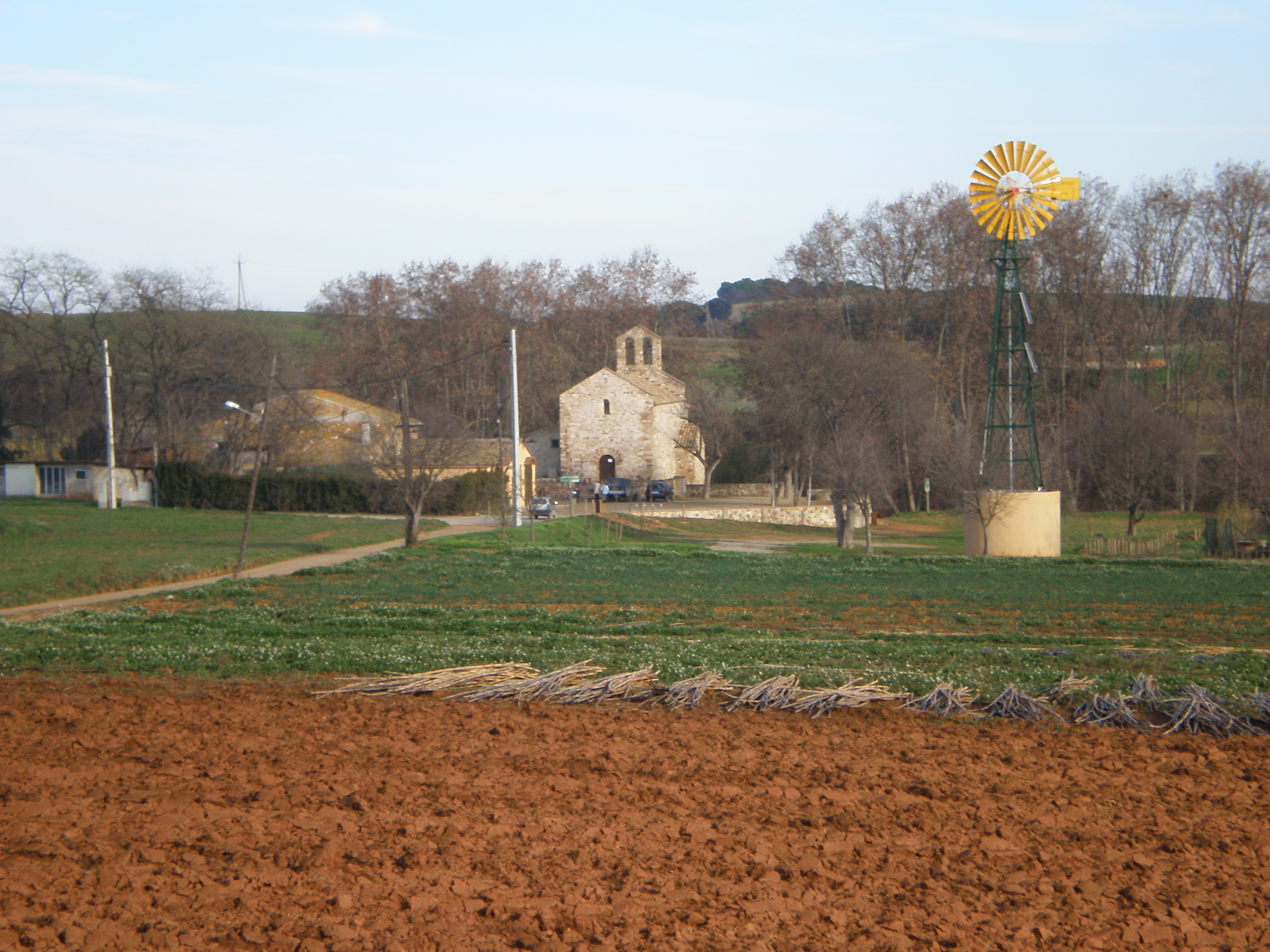 Gallecs en Mollet del Vallès (provincia de Barcelona).